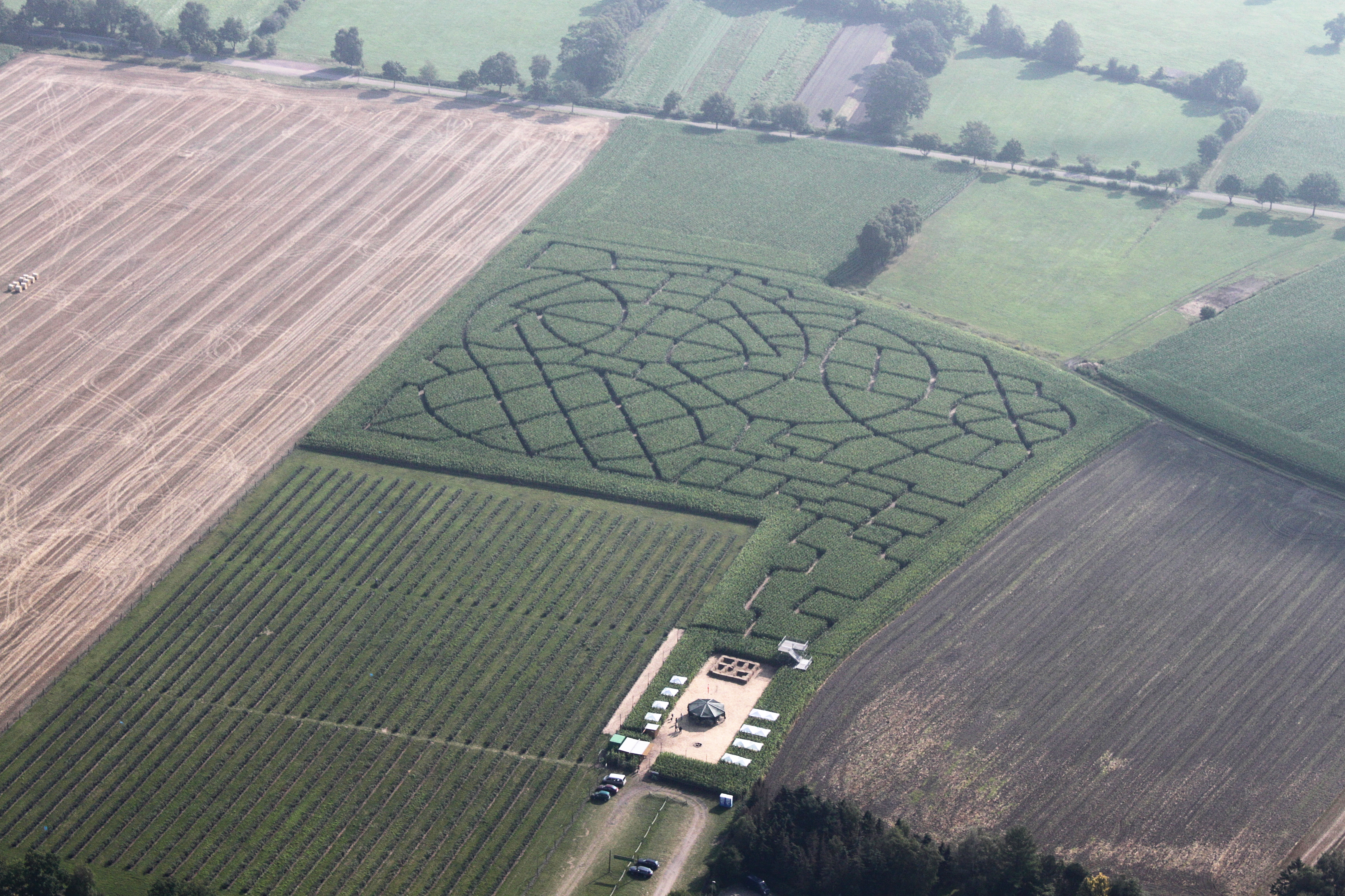 Maislabyrinth; Luftaufnahme; entlang der A1 (auf der Südseite) vom Dreieck Stuhr in Richtung Osten, bis zur Abfahrt Brinkum